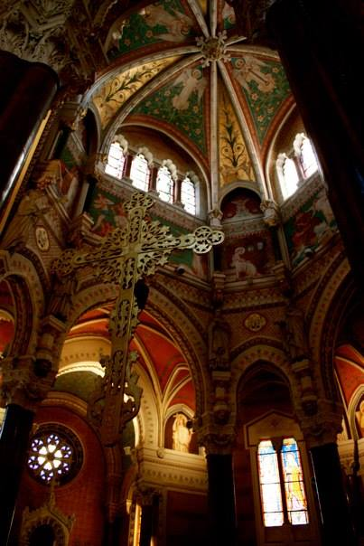 choeur du XIXe siècle